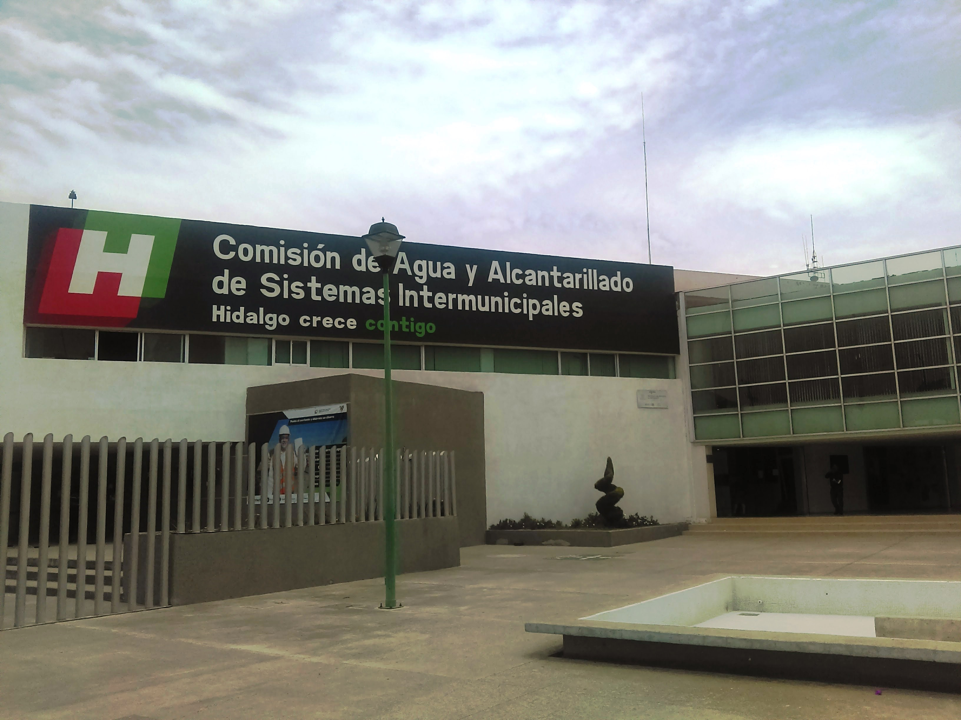 CASIM